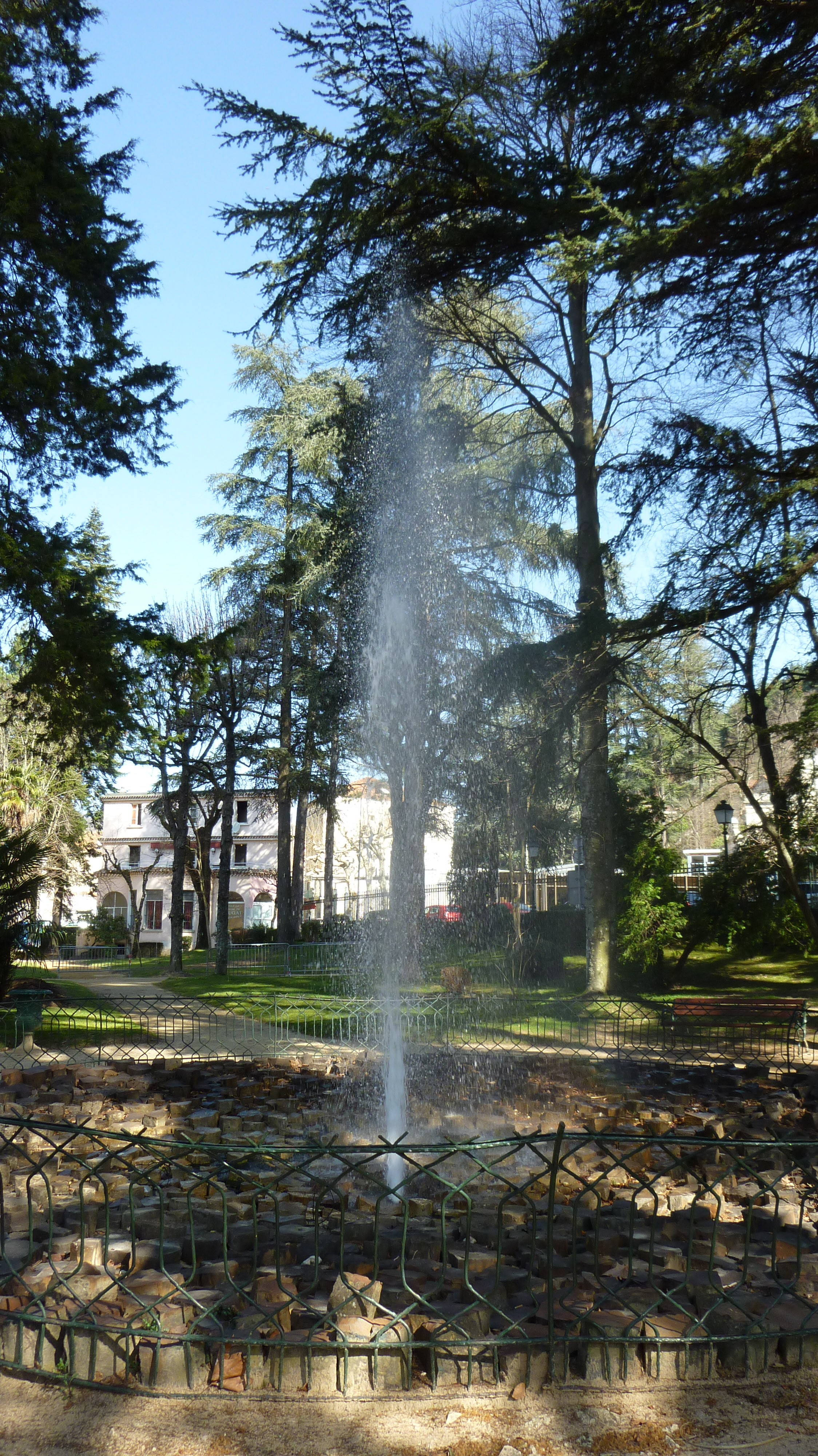 Source intermittente de Vals les bains (07 France). Elle jaillit quelques mn toutes des 6 heures. Geyser.